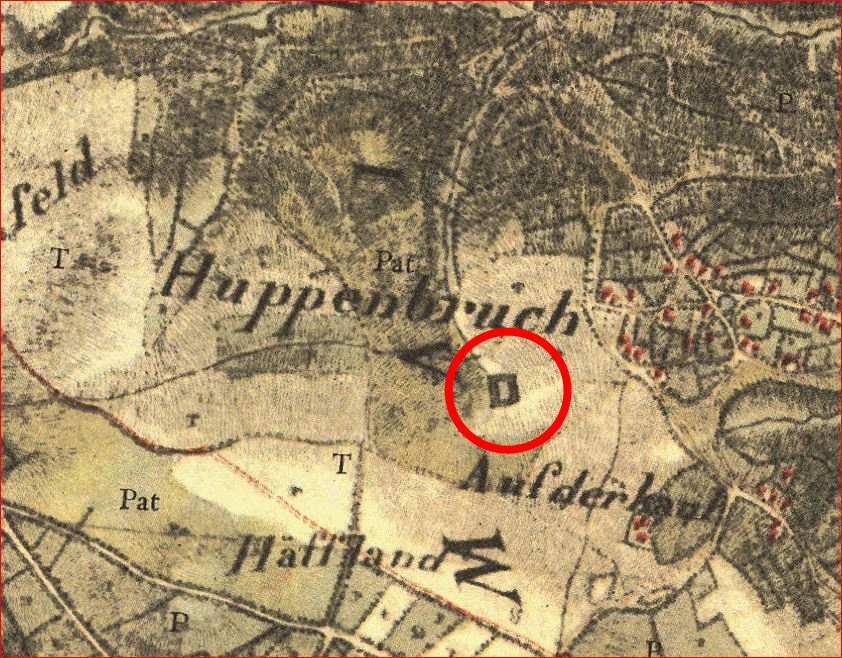 Historische Karte von Meyssenburg, Tranchot 1801–1828